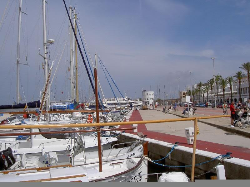 Hafenansicht von La Savina